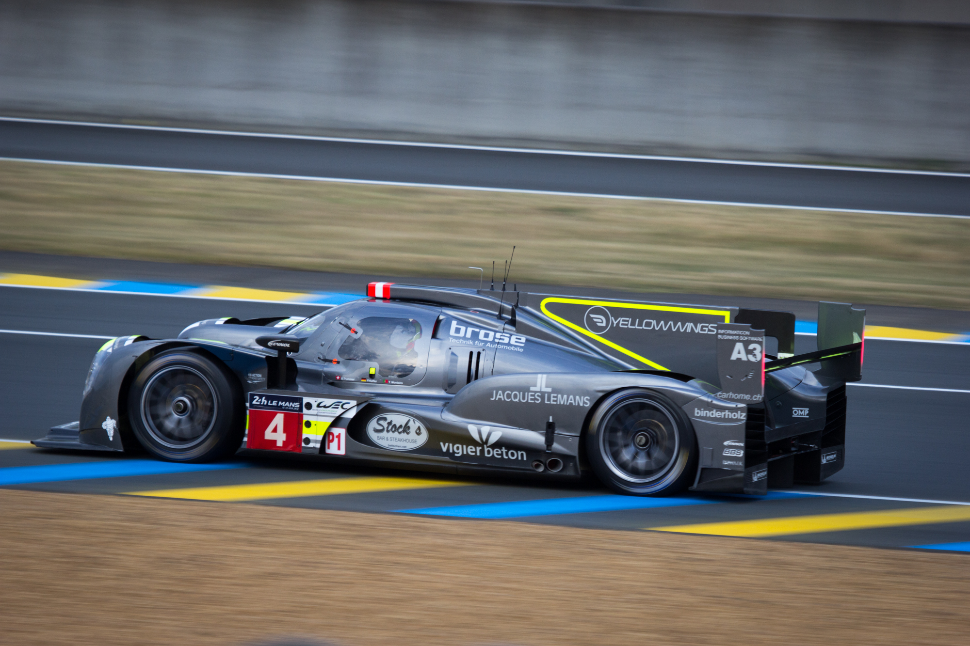 Drivers: Simon Trummer, Pierre Kaffer, Tiago Monteiro